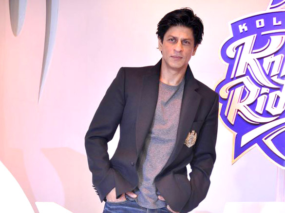 Shahrukh Khan at Shahrukh and Juhi unveil Kolkata Knight Riders' new logo